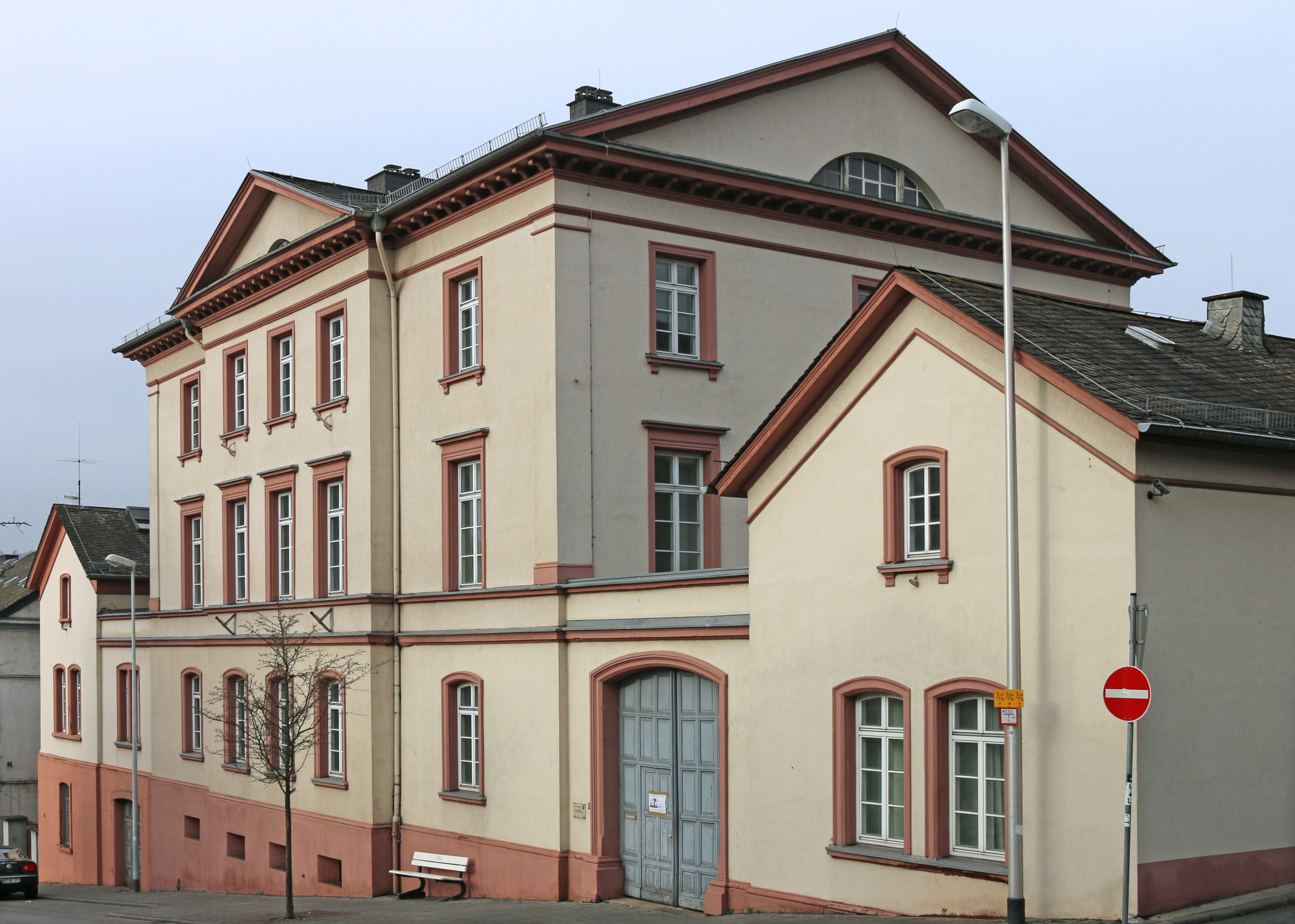 Weilburg: Denkmalgeschützter Palais "von Dungern" an der Frankfurter Straße